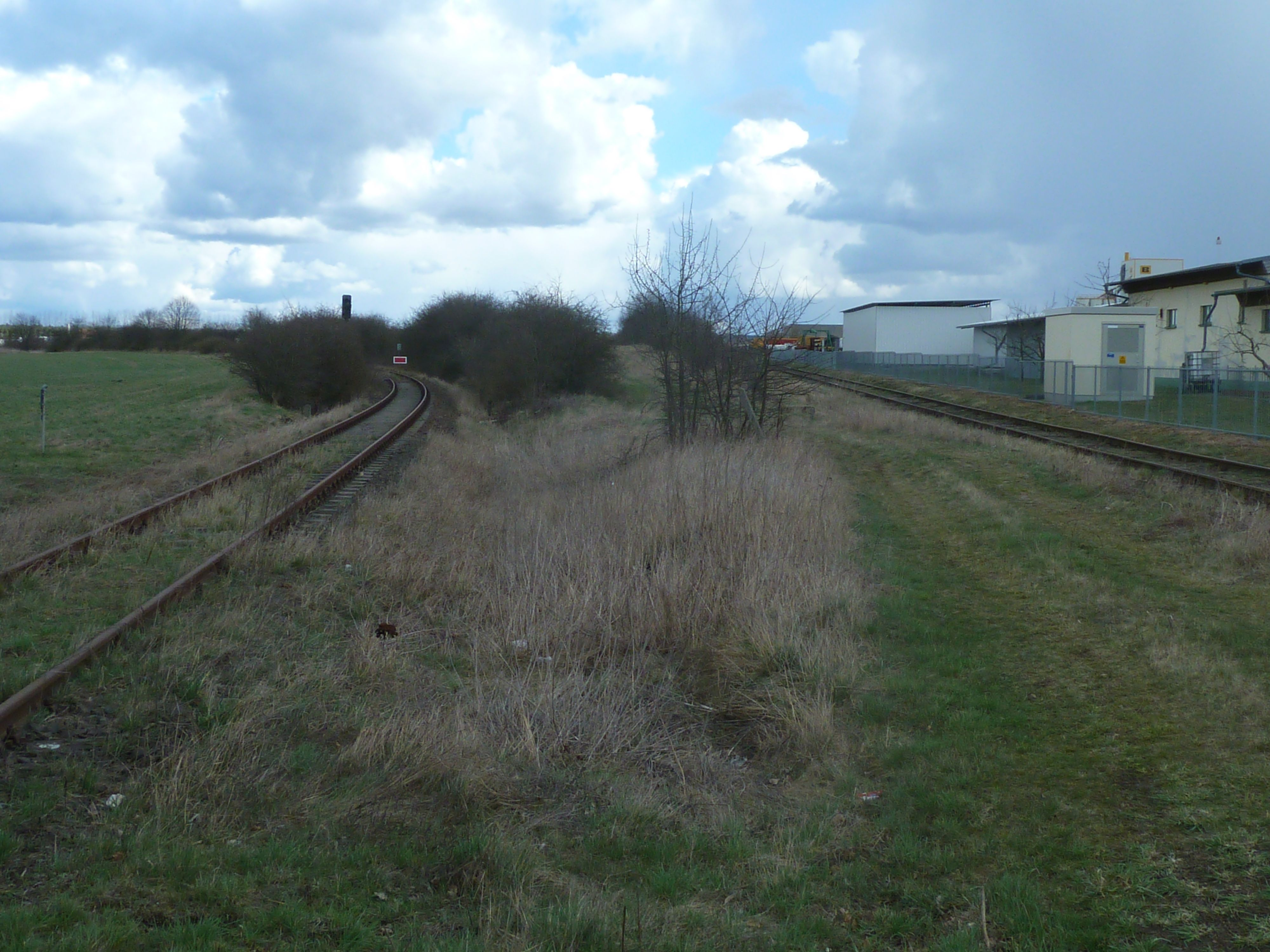 Anschlussgleis abzweigend von der Wriezener Bahn nordöstlich des Bahnhofs Werneuchen